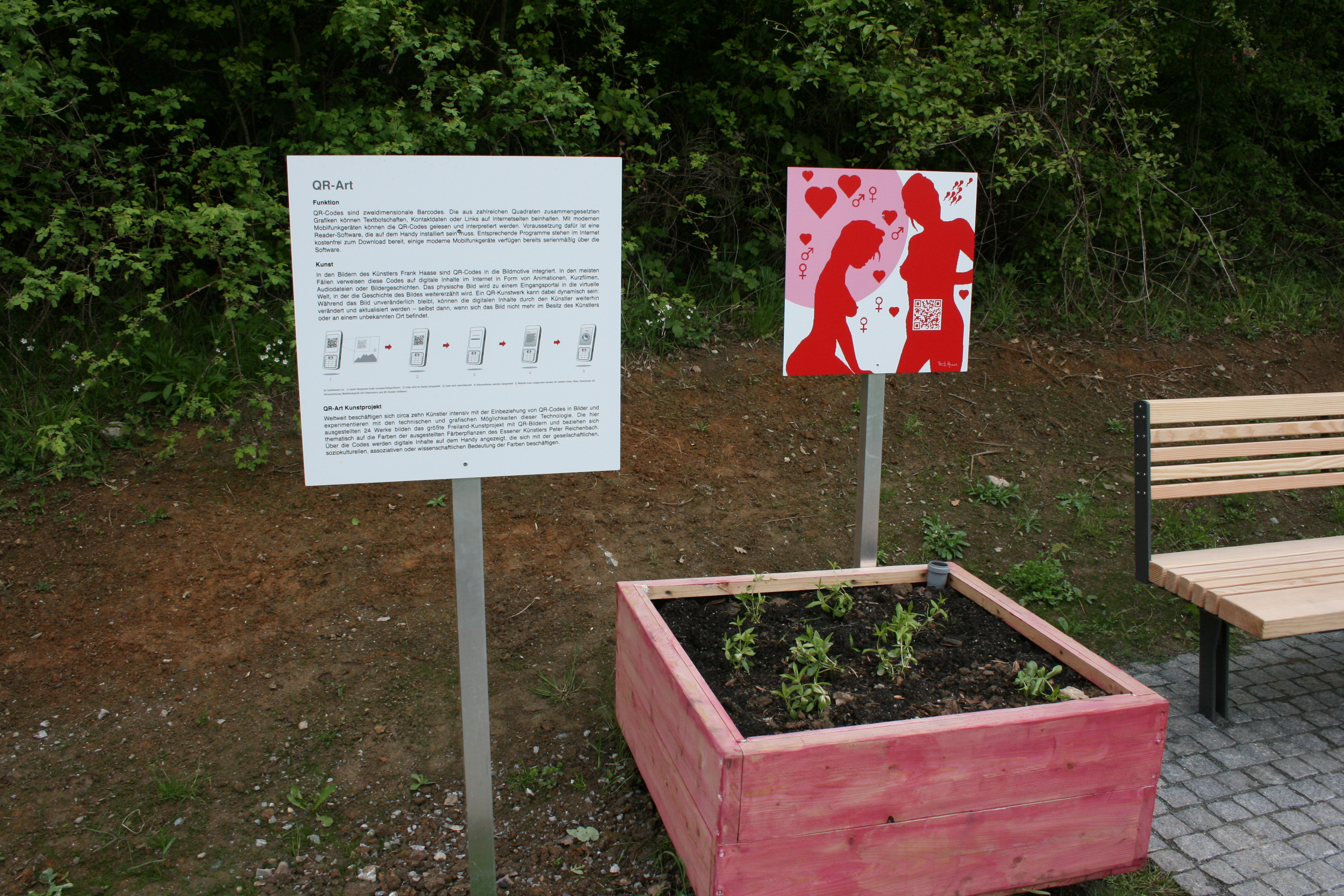 QR-Code-Anwendung bei der Landesgartenschau in Hemer 2010. Auf einem Kunstwerk befindet sich eine Art Barcode. Mit einem Handy lassen sich so zusätzliche Informationen zum Objekt erfahren. Voraussetzung ist eine entsprechende Software auf dem Handy. The content of the QR code is "